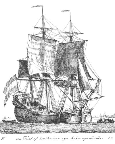 Katschip (een Kat of houthaalder zijn Anker opwindende)